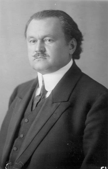 Депутат Четвертой Государственной думы от Курской губернии Николай Евгеньевич Марков.